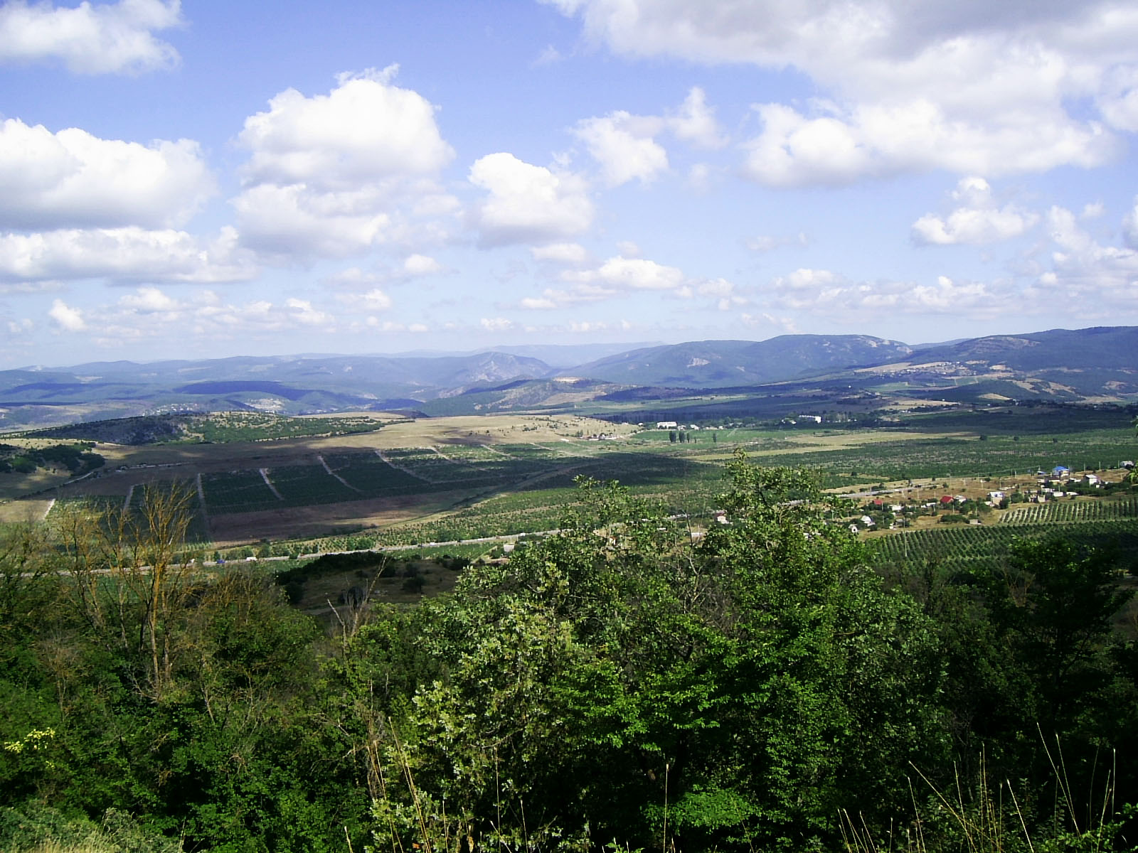 Меморіальний комплекс "Сапун-гора", Севастополь, Сапун-гора